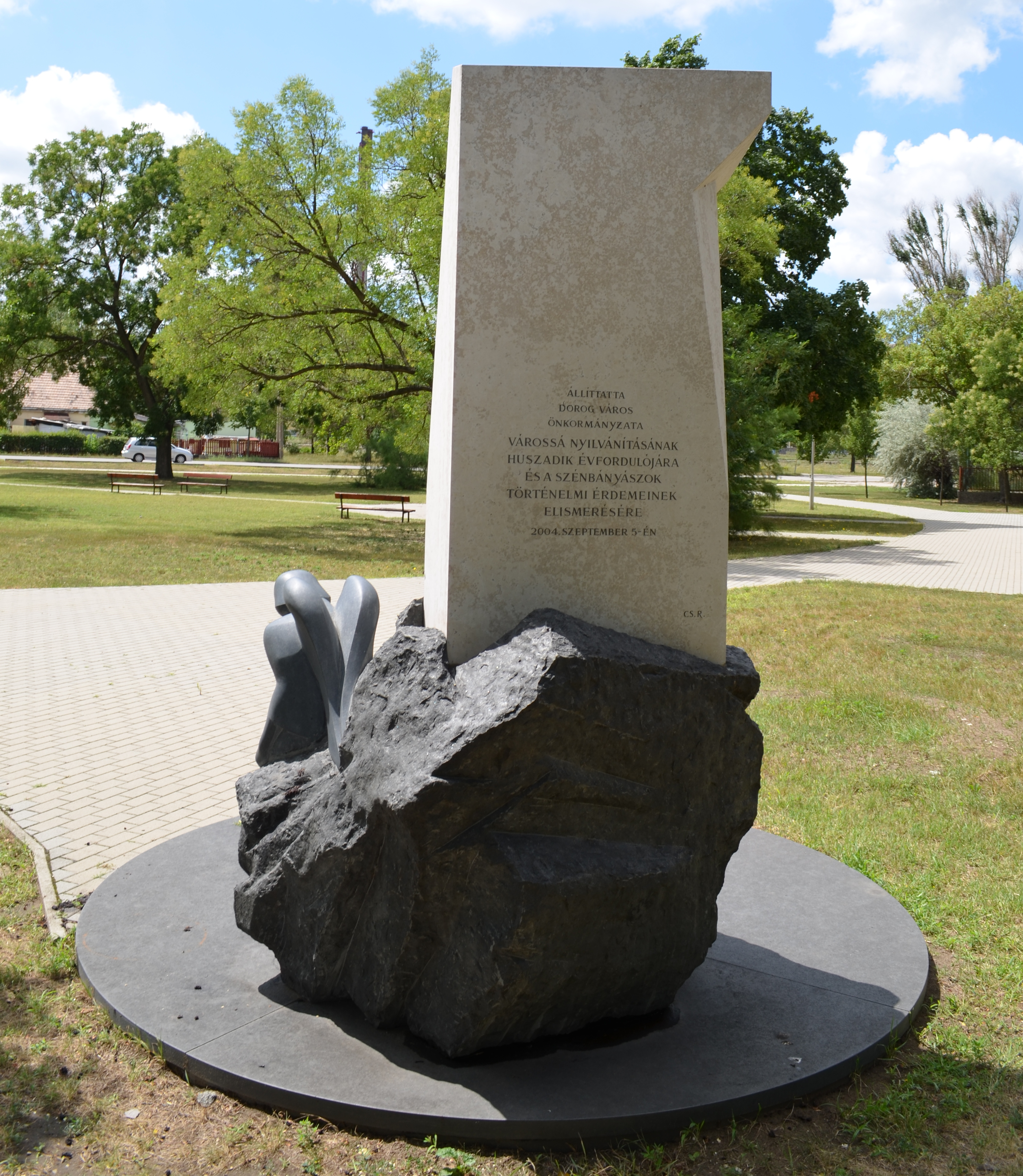 A dorogi szénbányász emlékmű.